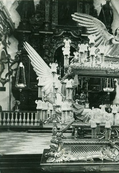 Antiguou Retablo de la Iglesia Parroquial de Nuestra Señora de Loreto, siglo XVIII, Algezares (Murcia) Spain